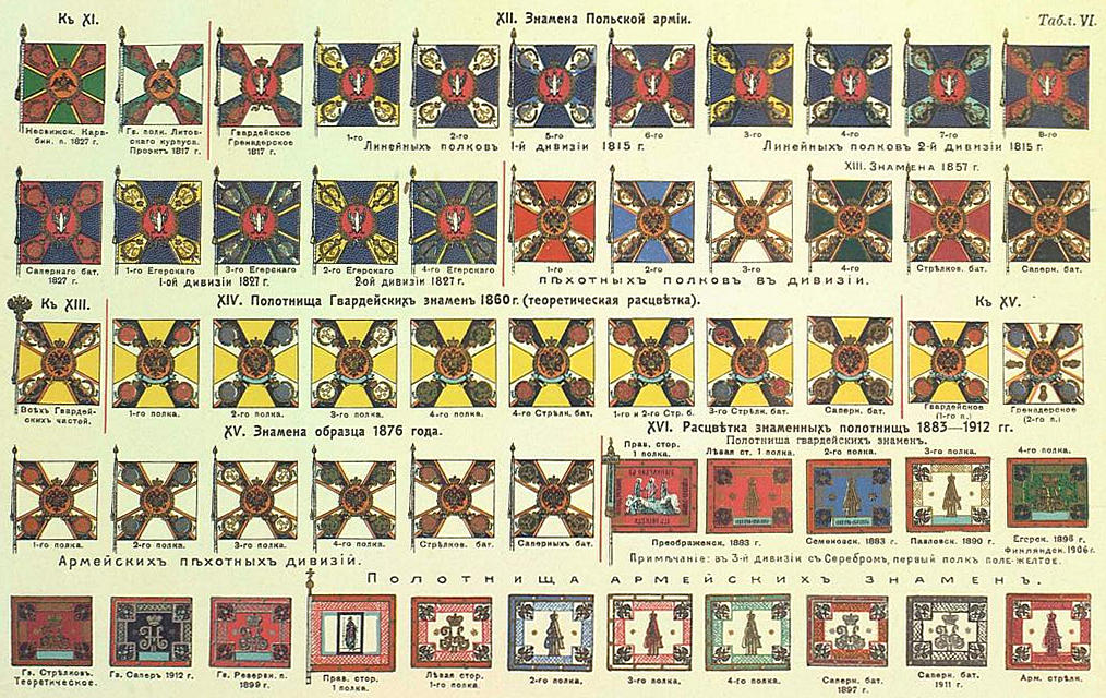 Это изображение было использовано для иллюстрирования статьи «Знамя» опубликованной в десятом томе «Военной энциклопедии», который был издан книгоиздательским товариществом И. Д. Сытина в 1912—1913 гг. в столице Российской империи городе Санкт-Петербурге.